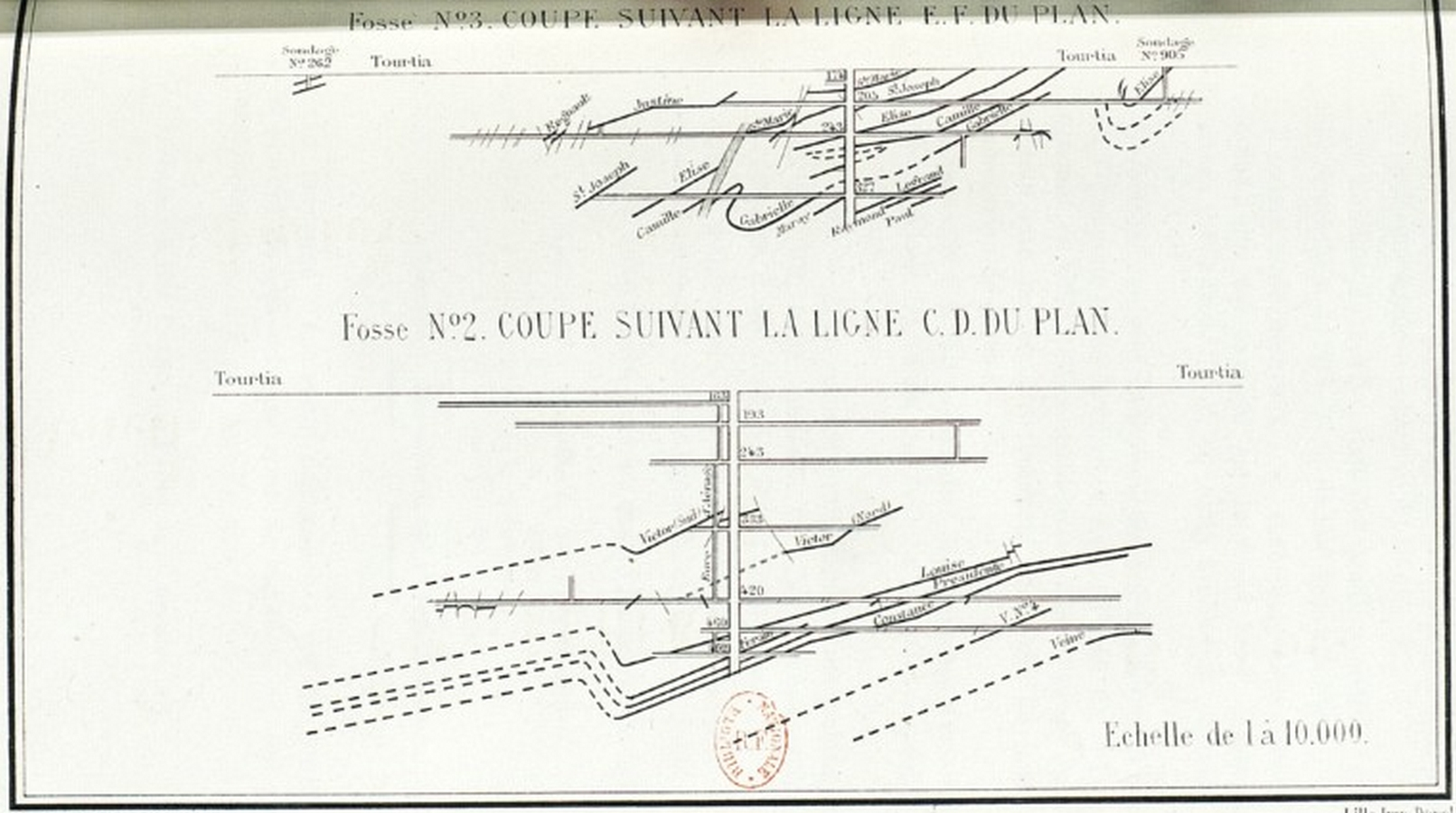 Coupe verticale aux puits n° 3 et 2 de la Compagnie des mines de Ferfay.